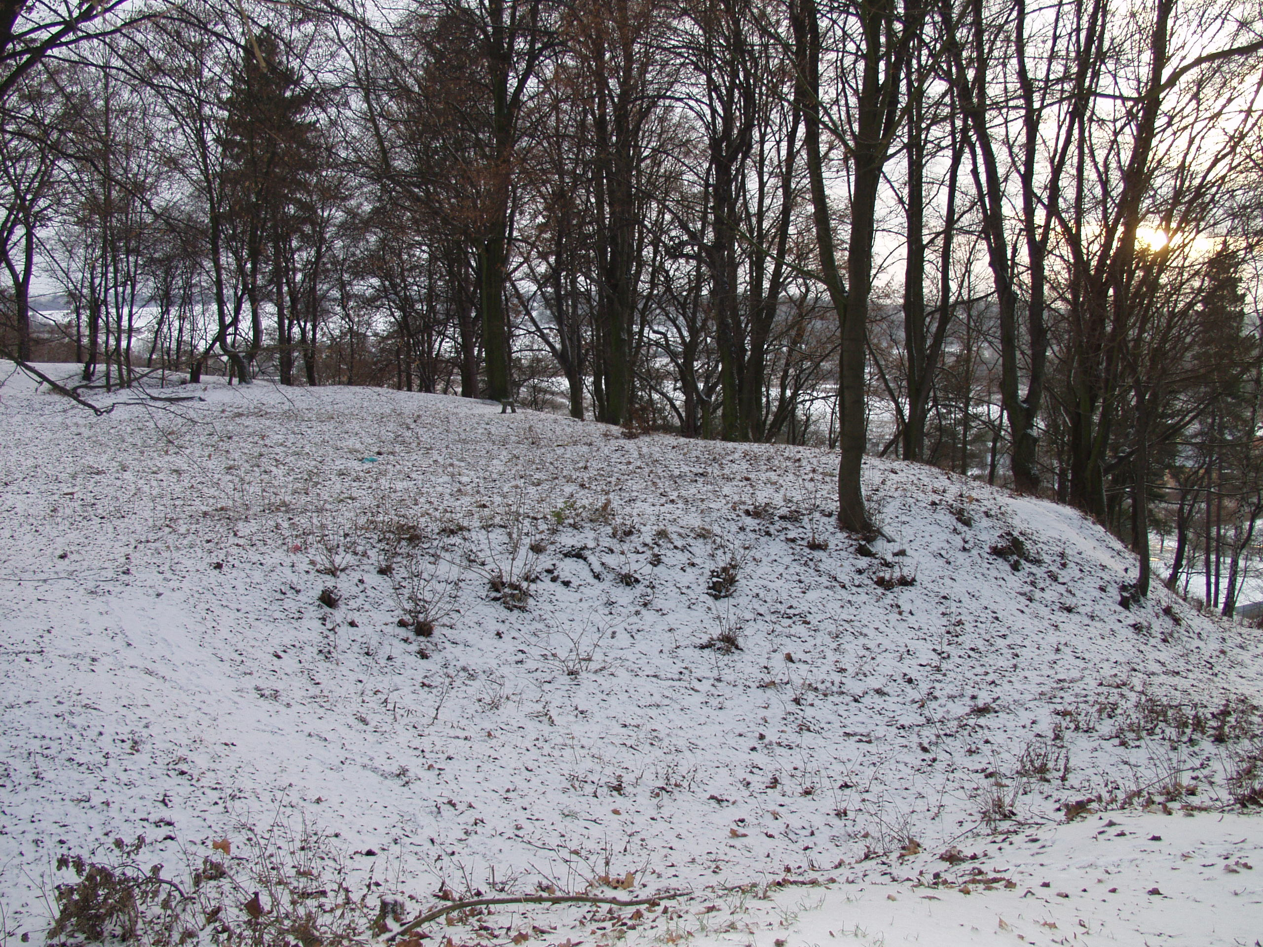 Hrad, zřícenina a archeologické stopy (Kynšperk nad Ohří)